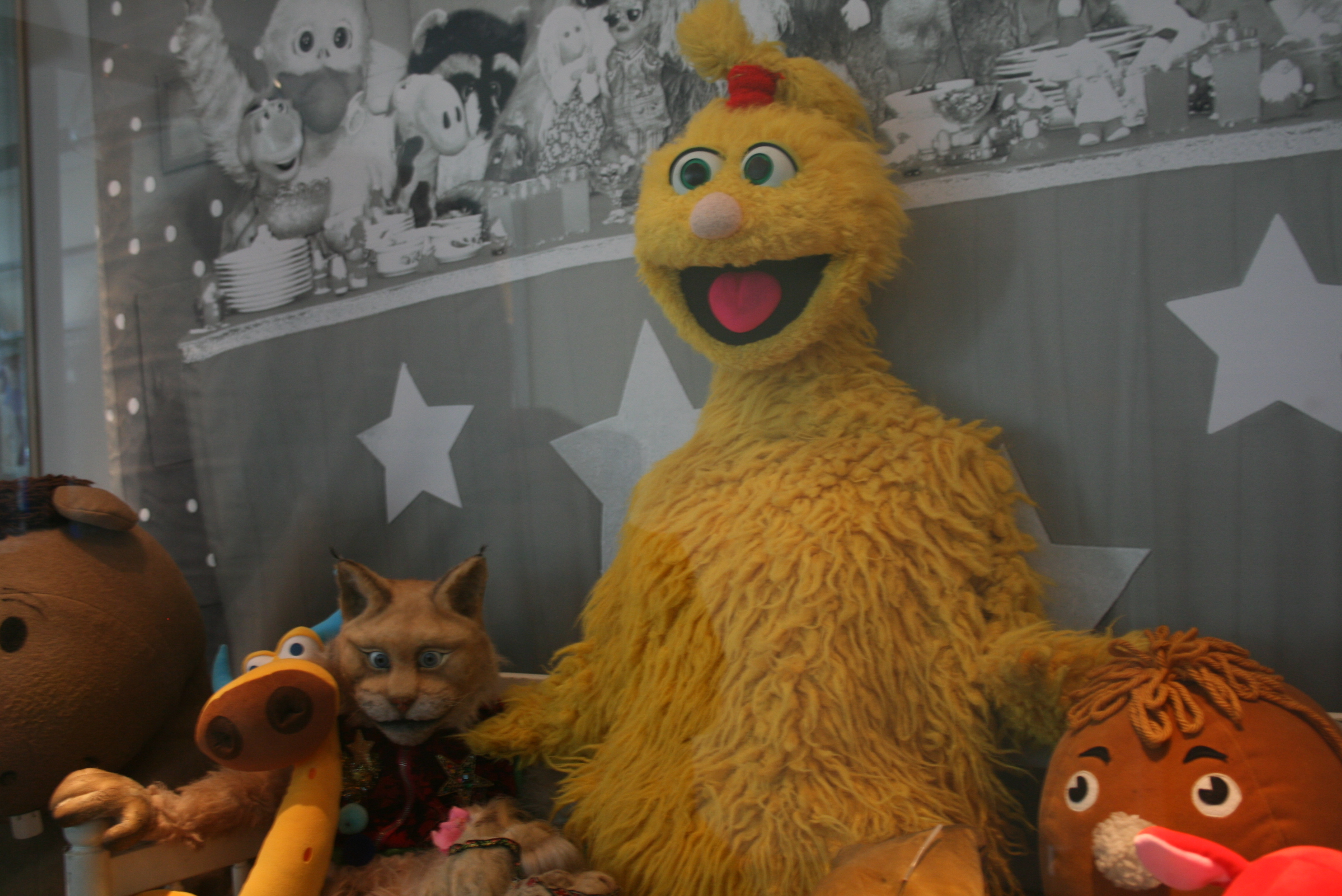 Dukken til Alfa i Sesam Stasjon står utstilt i opplevelsessenteret på NRK Marienlyst.